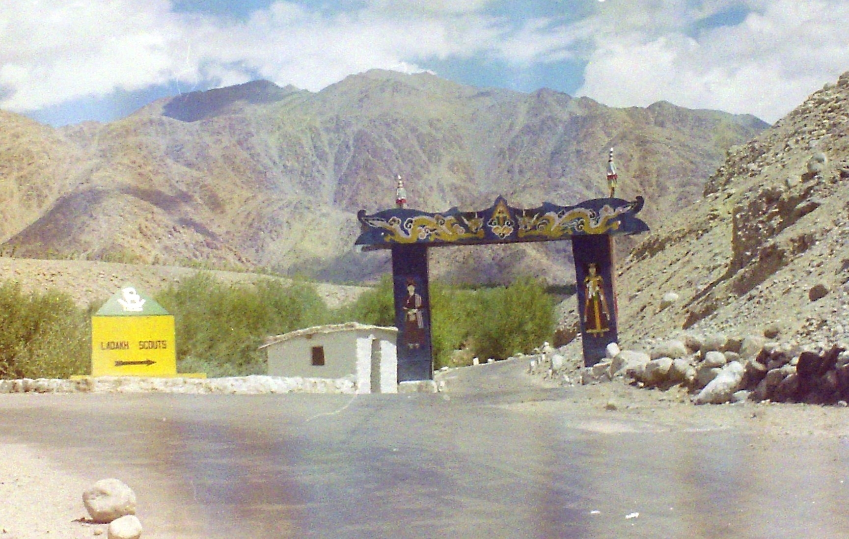 “Project l’Himank” panneau de la sécurité routière au Ladakh ( scan d'une photo prise lors d'un voyage en 1995)